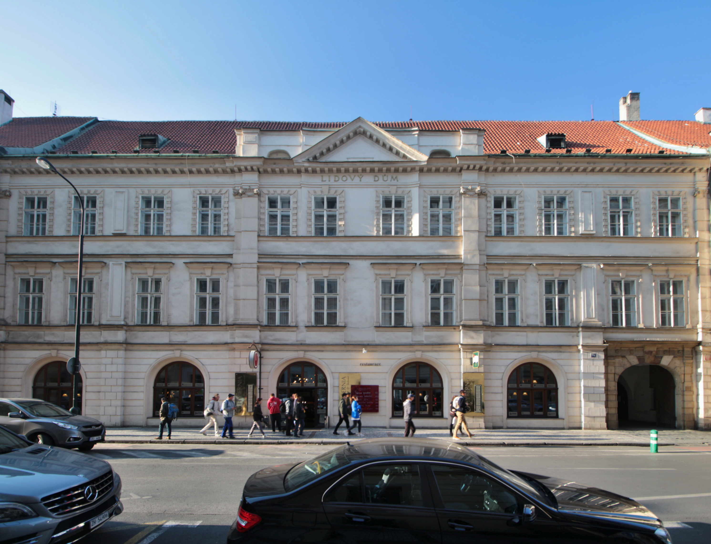 Praha-Hybernská ulice, Losyovský palác (též Lidový dům)